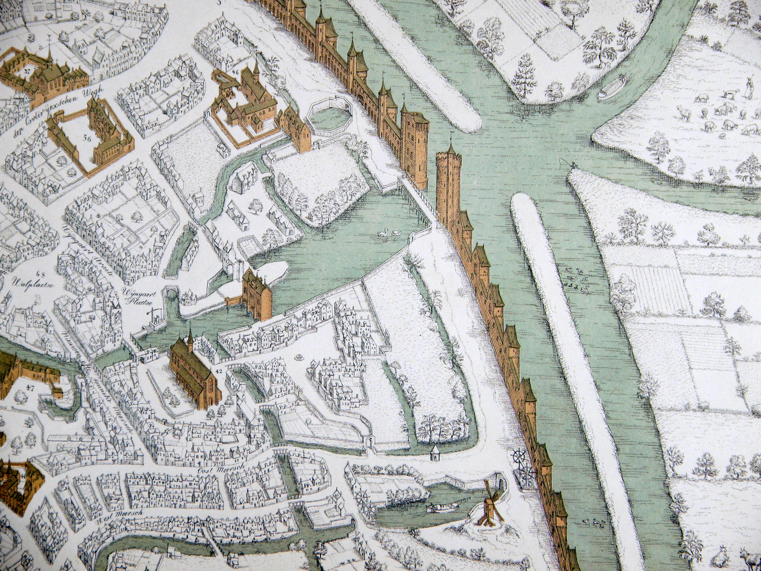 Plan van Brugge (1562) door Marcus Gerardus (of Marcus Gerards, Marc Gheeraerts). Close-up van het zuidelijke deel van Brugge (rond begijnhof).